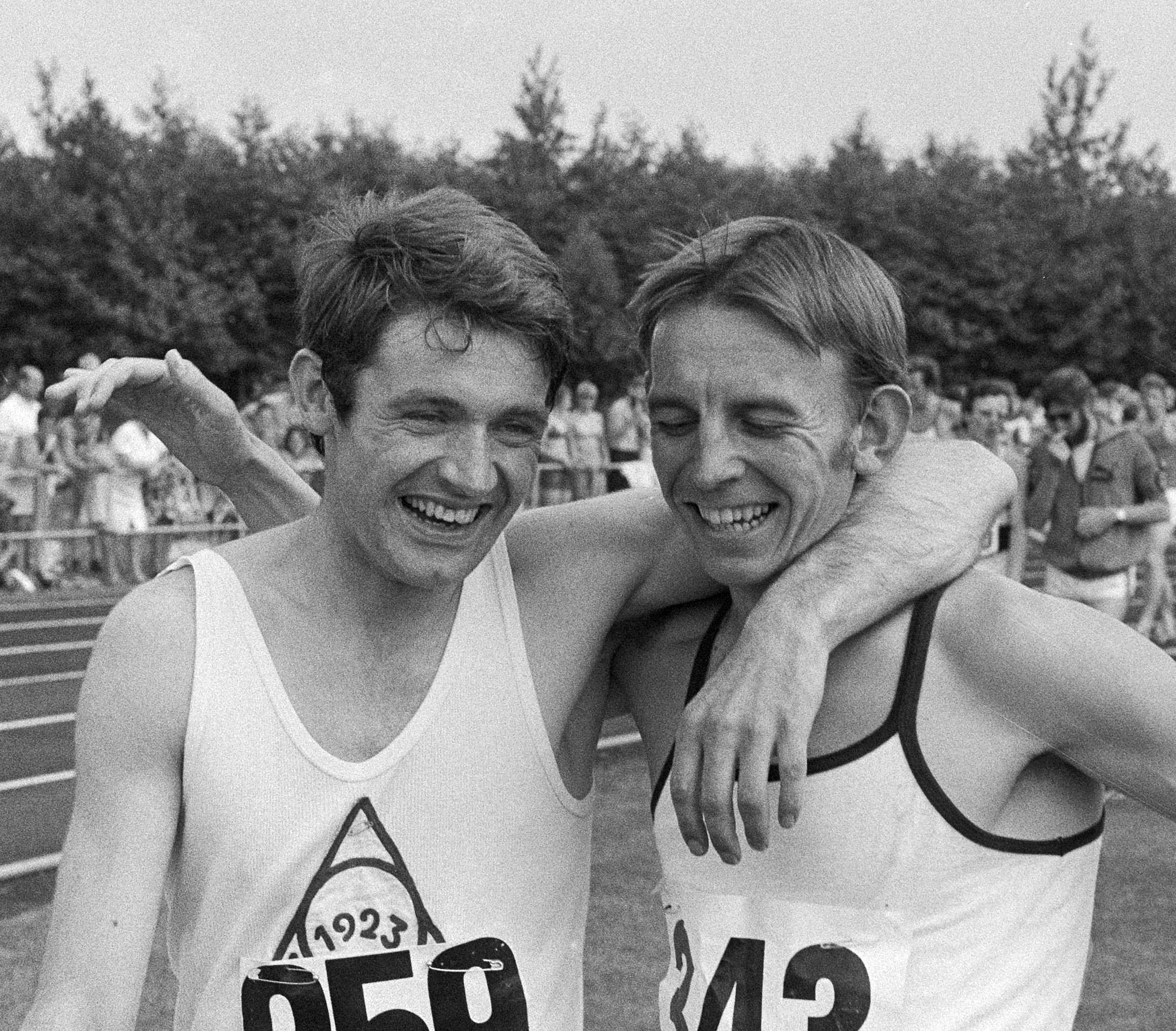 Atletiekkampioenschappen Drachten, nr. 7, 8 links Bram Wassenaar , rechts Haico Scharn , kop